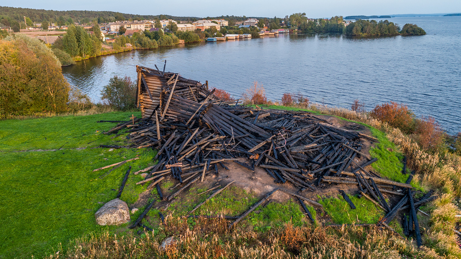 Церковь Успения Пресвятой Богородицы после пожара 10 августа 2018 года: на мысе, вдающемся в Чупа-Губу Онежского озера, Кондопога, Кондопожский район, Карелия